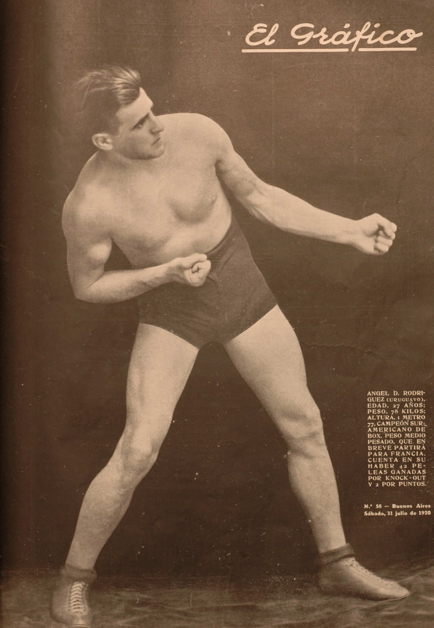 El Grafico del 31 de Julio de 1920. Edicion 58